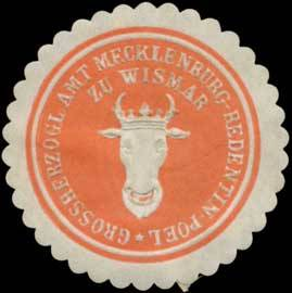 Sealing stamp Title: Grossh. Amt Mecklenburg-Redentin-Poel zu Wismar Description: rot, weiß, geprägt Place: Redentin size: 4 cm